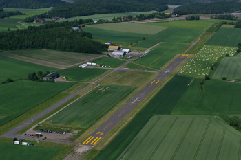 Jarlsberg_Flyplass